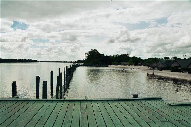 Privé foto